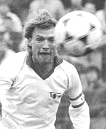 Title: 1. FC Union Berlin - Energie Cottbus 1:0 Factual corrections and alternative descriptions are encouraged separately from the original description. Additionally errors can be reported at this page to inform the Bundesarchiv. Original historic description: ADN-ZB-Settnik-5.4.89-sche- Berlin: Fußball-Oberliga-Punktspiel 1. FC Union Berlin - Energie Cottbus 1:0- Zu zwei wichtigen Punkten gegen den Abstieg kam der Gastgeber vor 4 500 Zuschauern in der Wuhlheide. Union-Angreifer Andre Deffke bei einer gelungenen Kopfballaktion, assistiert von seinen Mannschaftskameraden Peter Schohknecht (l) und Kapitän Olaf Seier (3.v.l.). Der Cottbuser Detlef Irrgang (r) kann nicht mehr eingreifen.